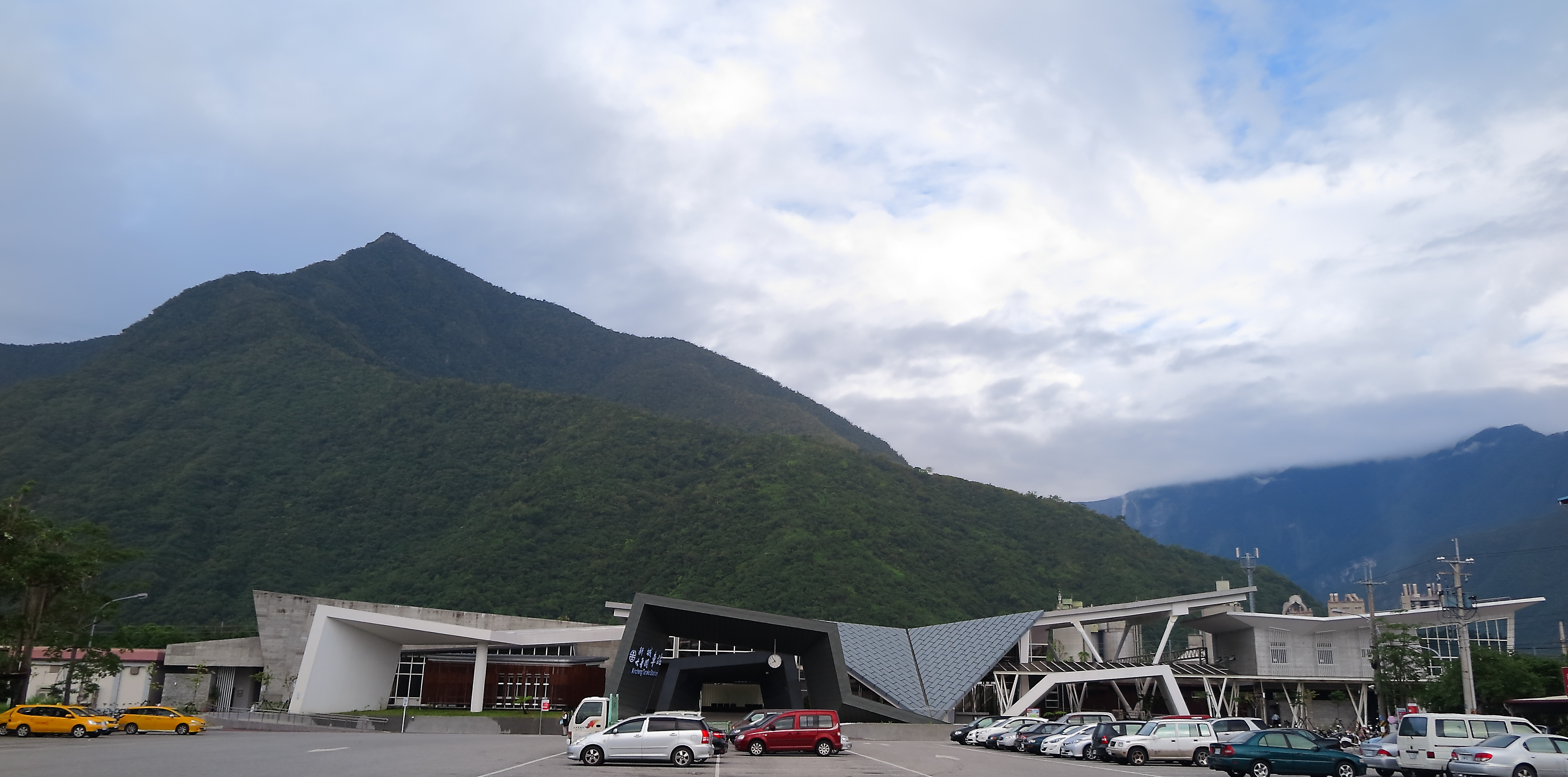 中文（台灣）: 臺灣鐵路管理局新城（太魯閣）車站周遭外觀。